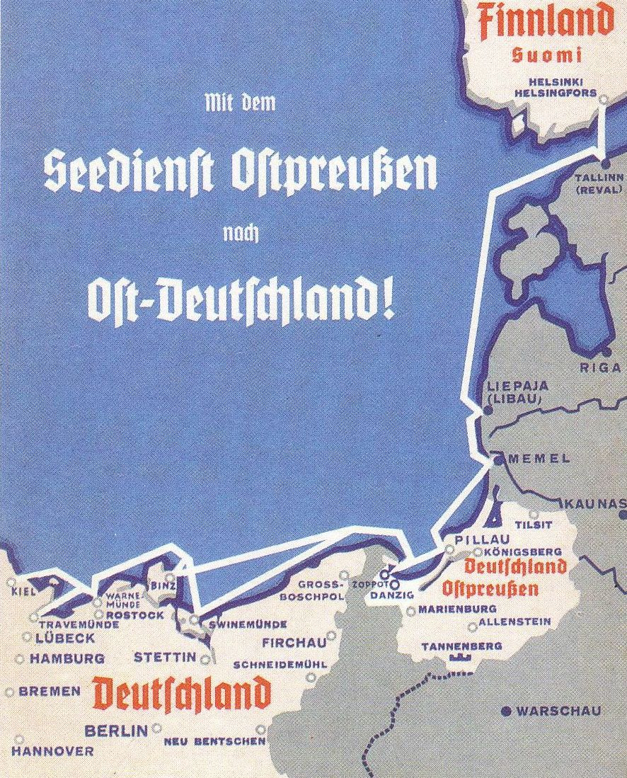 Plakat des Seedienst Ostpreußen